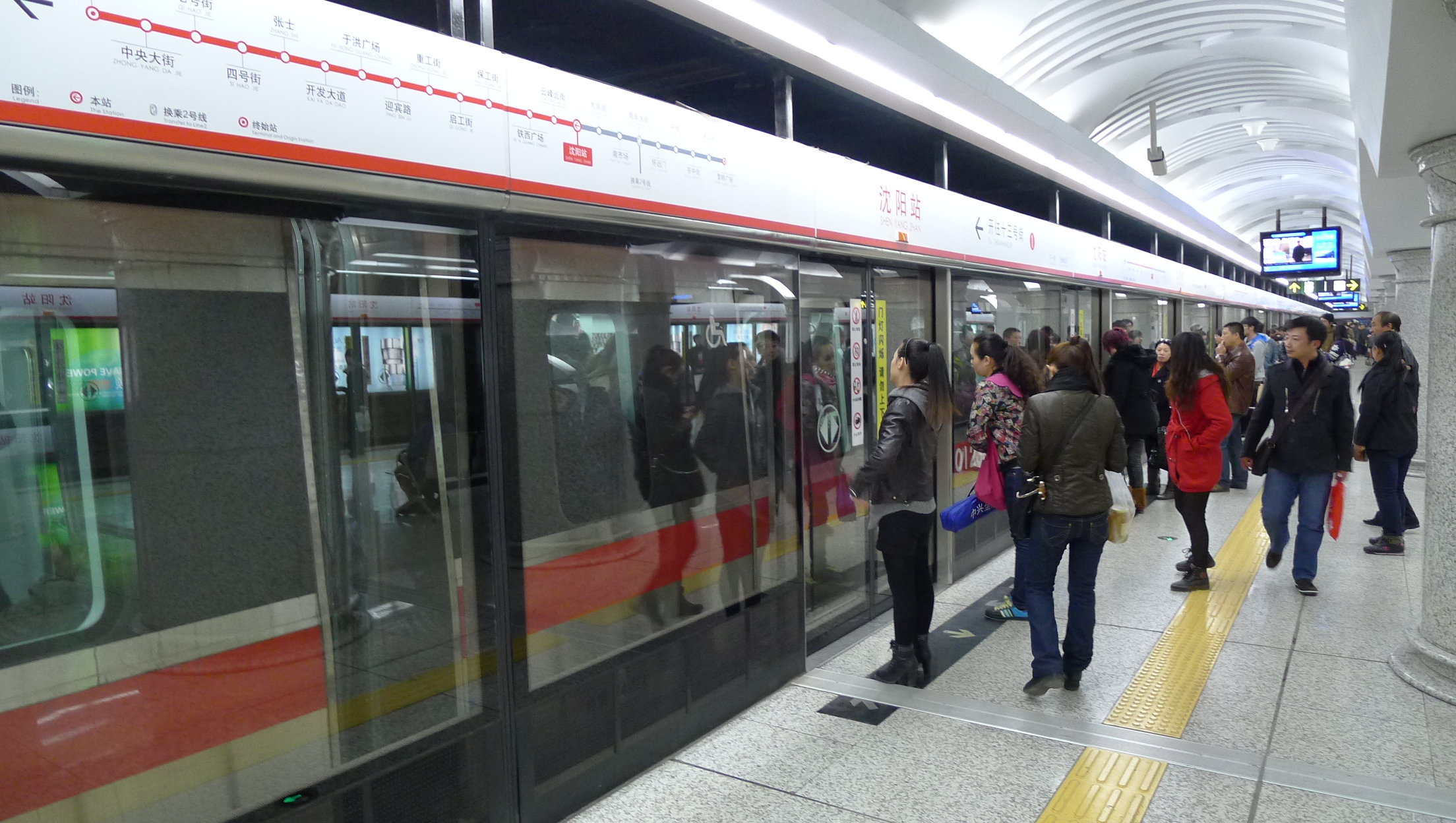 沈阳地铁一号线沈阳站站